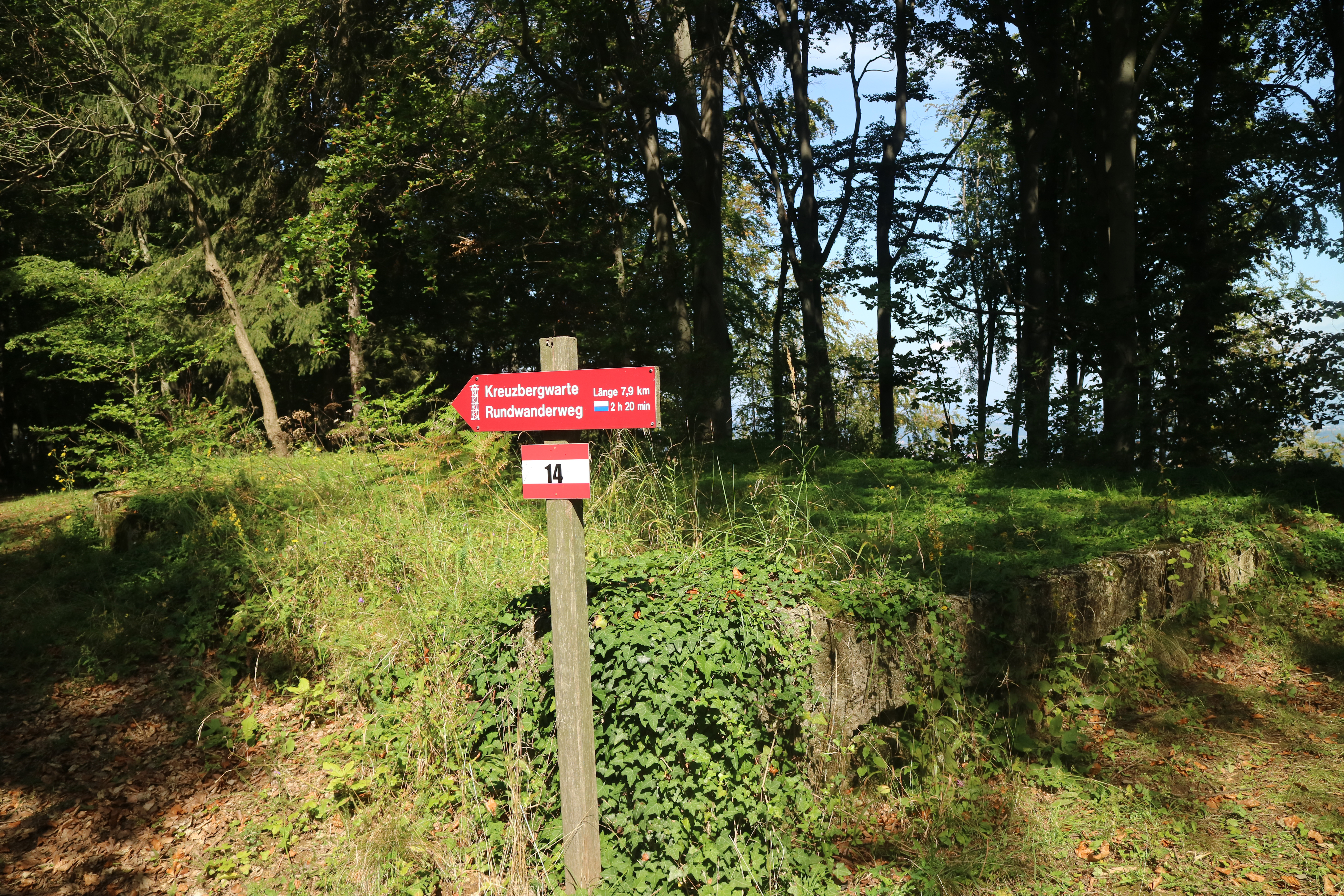 Steinfundament der alten Warte am Kreuzberg, Gemeinden Großklein/Leutschach (Südsteiermark)